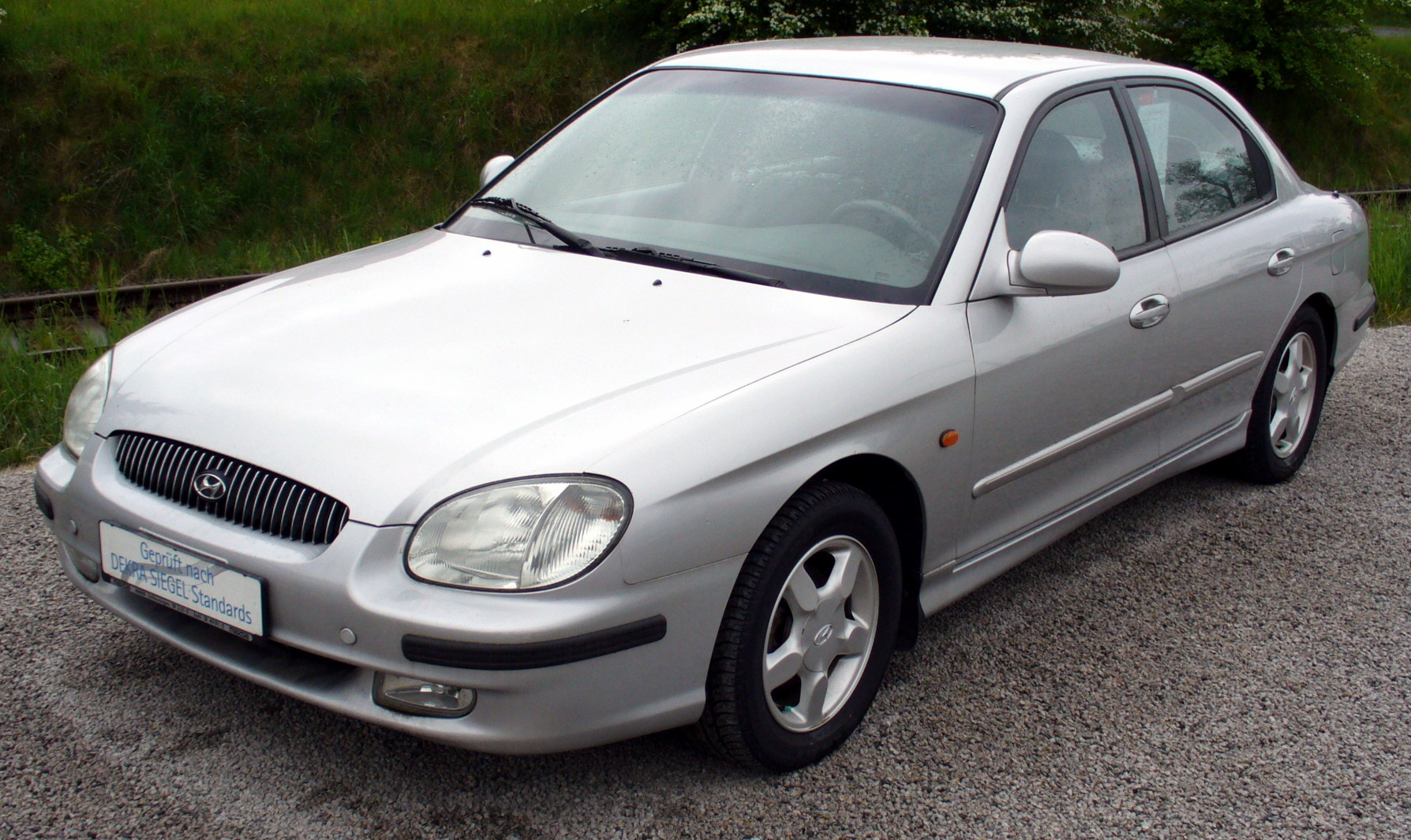 Hyundai Sonata